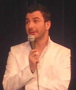 Michael Youn à Cannes en 2007